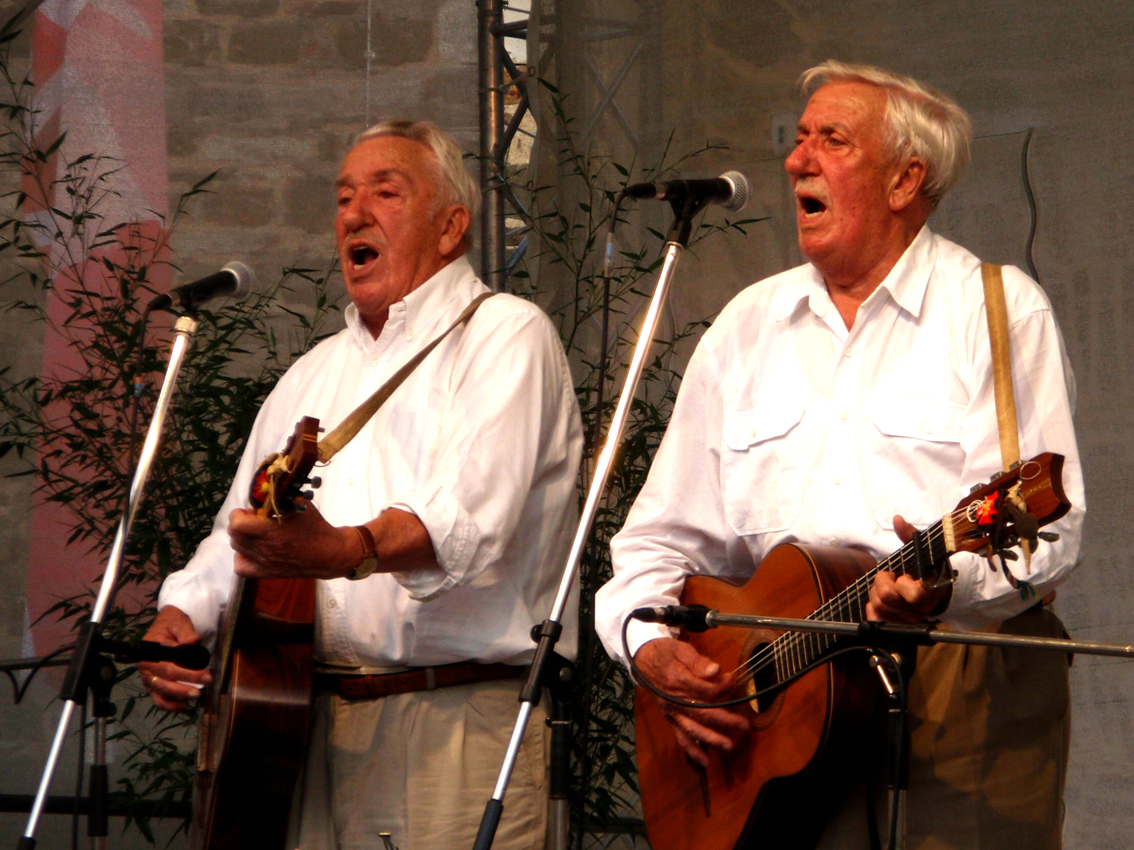 Hein umnd Oss Kröher 2011 auf der Festung Ehrenbreitstein, Koblenz. Die Zwillingsbrüder Hein (* 17. September 1927 in Pirmasens; † 14. Februar 2016 ebenda) und Oss Kröher (* 17. September 1927 in Pirmasens), eigentlich Heinrich und Oskar Kröher, zwei deutsche Volkslied-Sänger und Liedermacher, absolvierten jahrzehntelang überwiegend gemeinsame Auftritte.